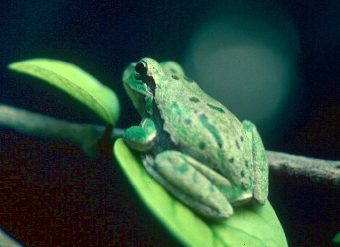 Der Thyrrhenische Laubfrosch Hyla sarda Foto: Michael Linnenbach - GNU FDL